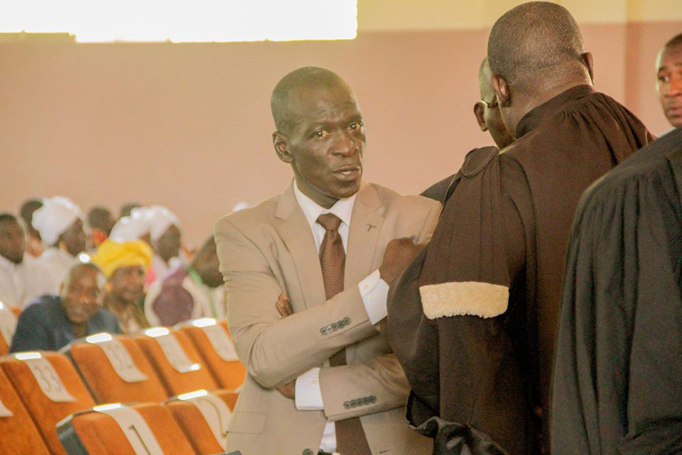 Reprise du procès d'Amadou Haya Sanogo devant la cour d'assises de Sikasso, dans le sud du Mali, le 1er décembre 2016. (VOA/Kassim Traoré)